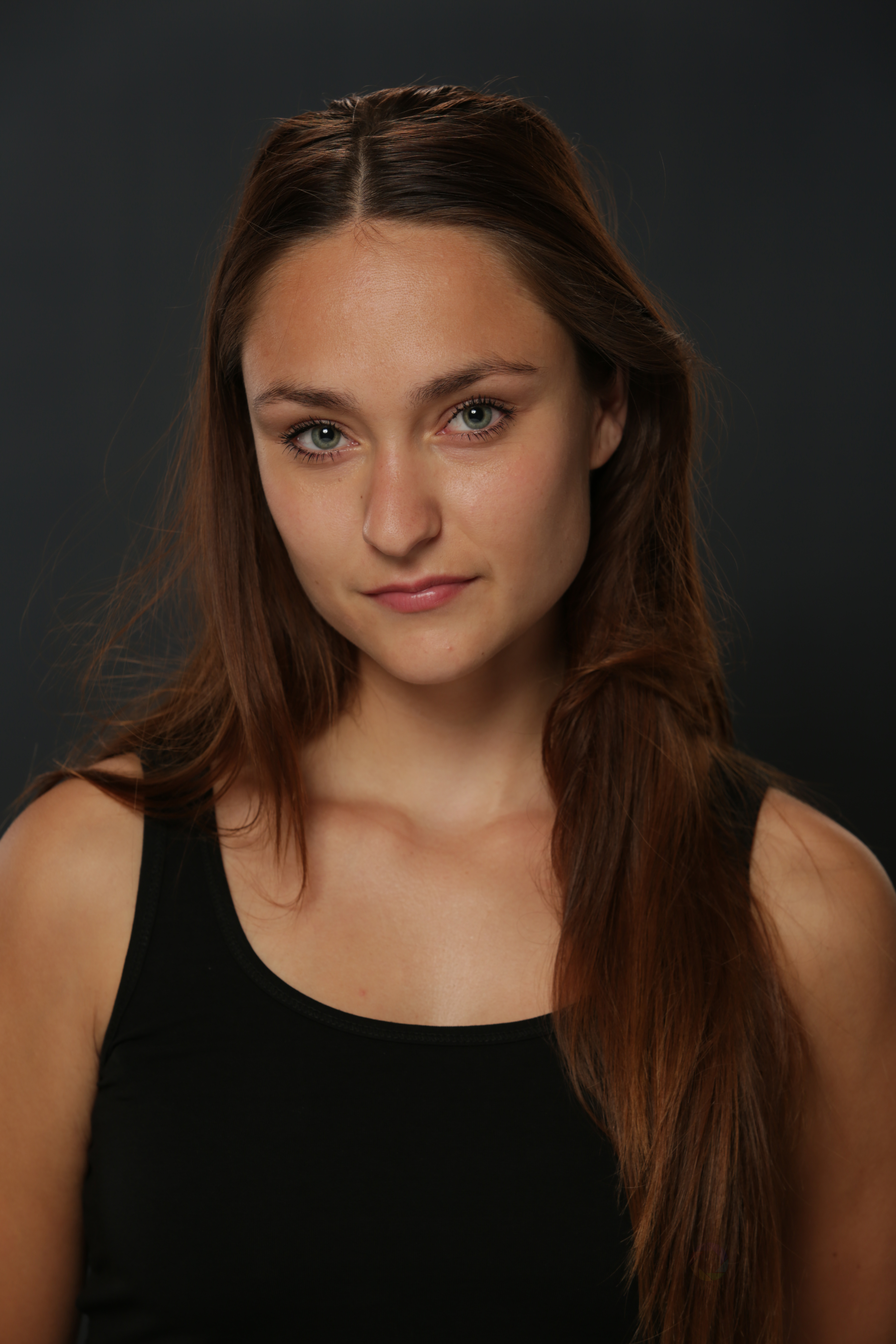 Melody Klaver